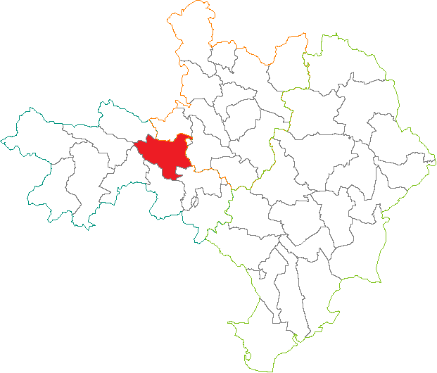 Situation du canton dans le département du Gard (France)